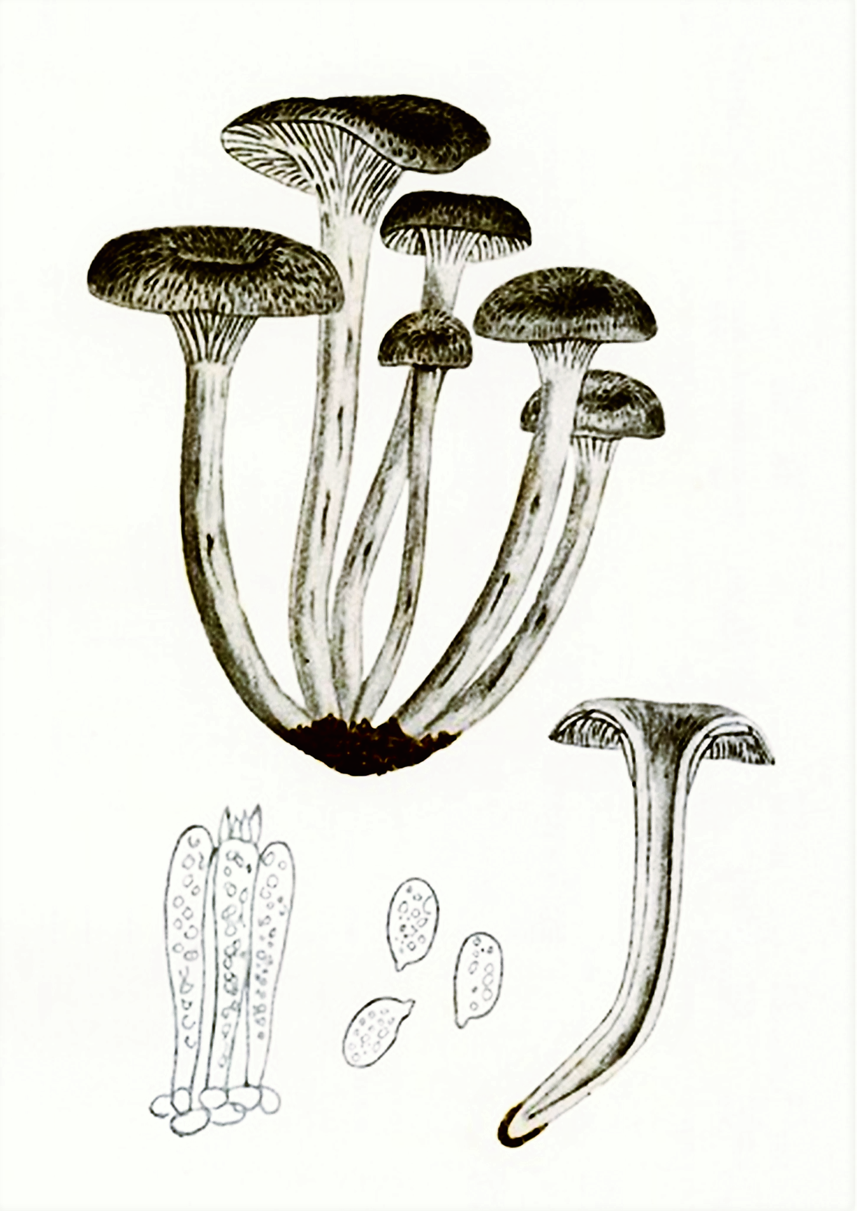 Giacomo Bresadola: Cantharellus cinereus (Pers., 1798) Fr., (1821)